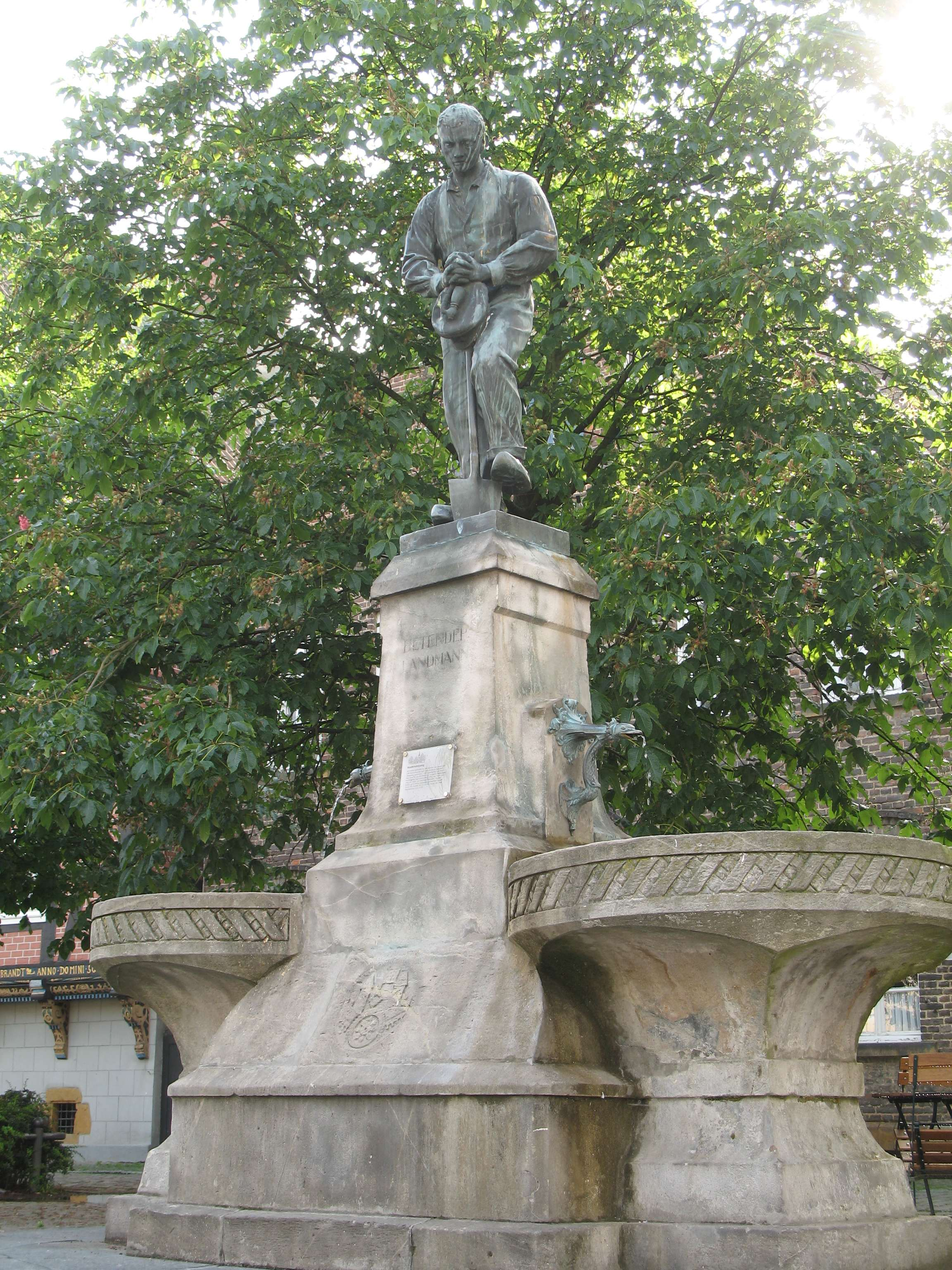 Wiedenbrück: Denkmal „Betender Landmann“ von Bernhard Heising in Rheda-Wiedenbrück